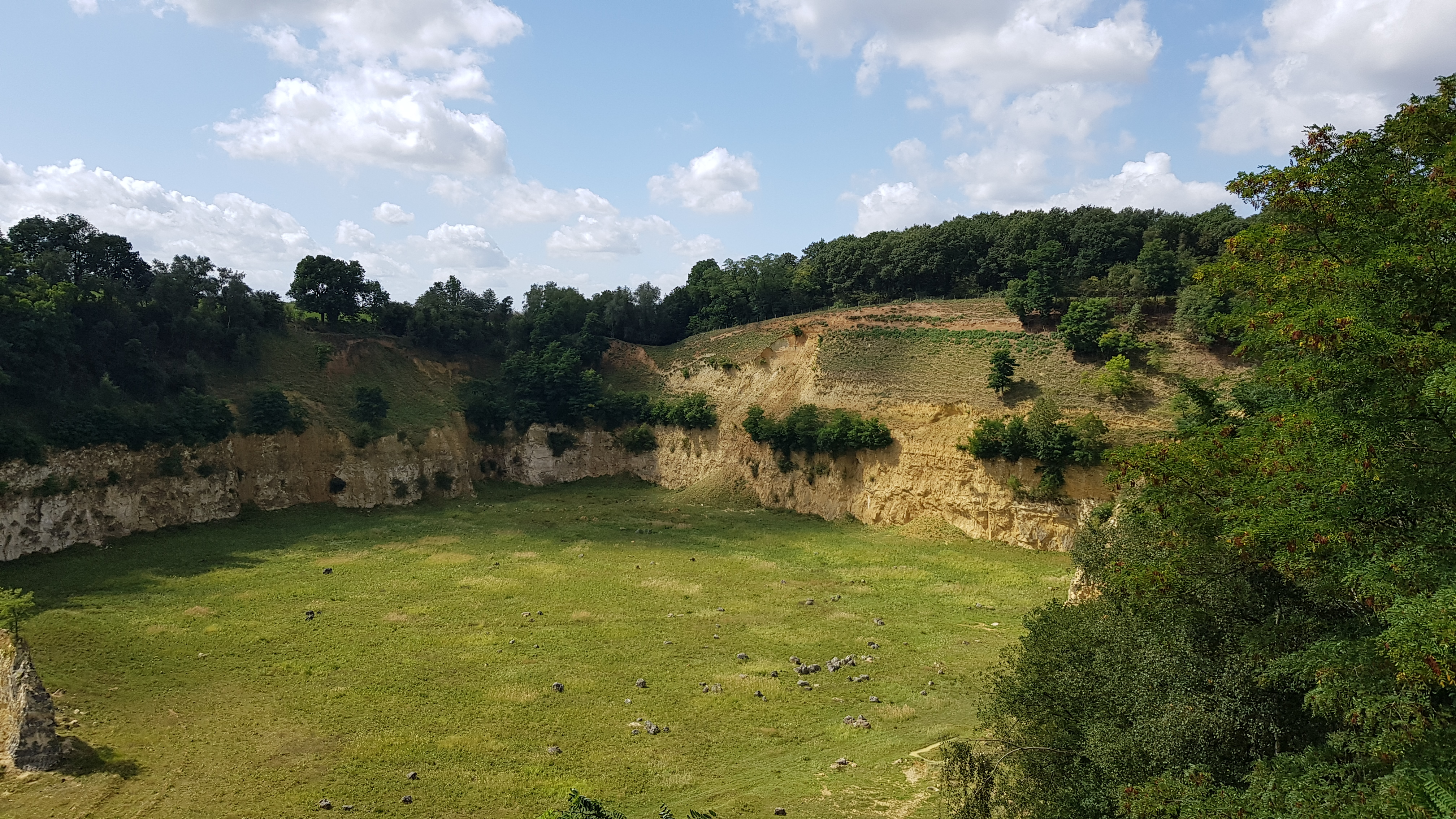 Curfsgroeve, Geulhem, Nederland